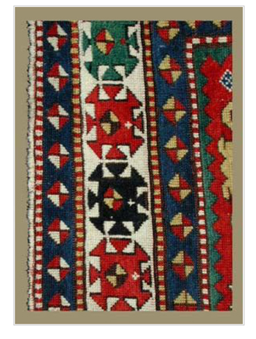 Фрагмент армянского ковра из Лори-Памбака